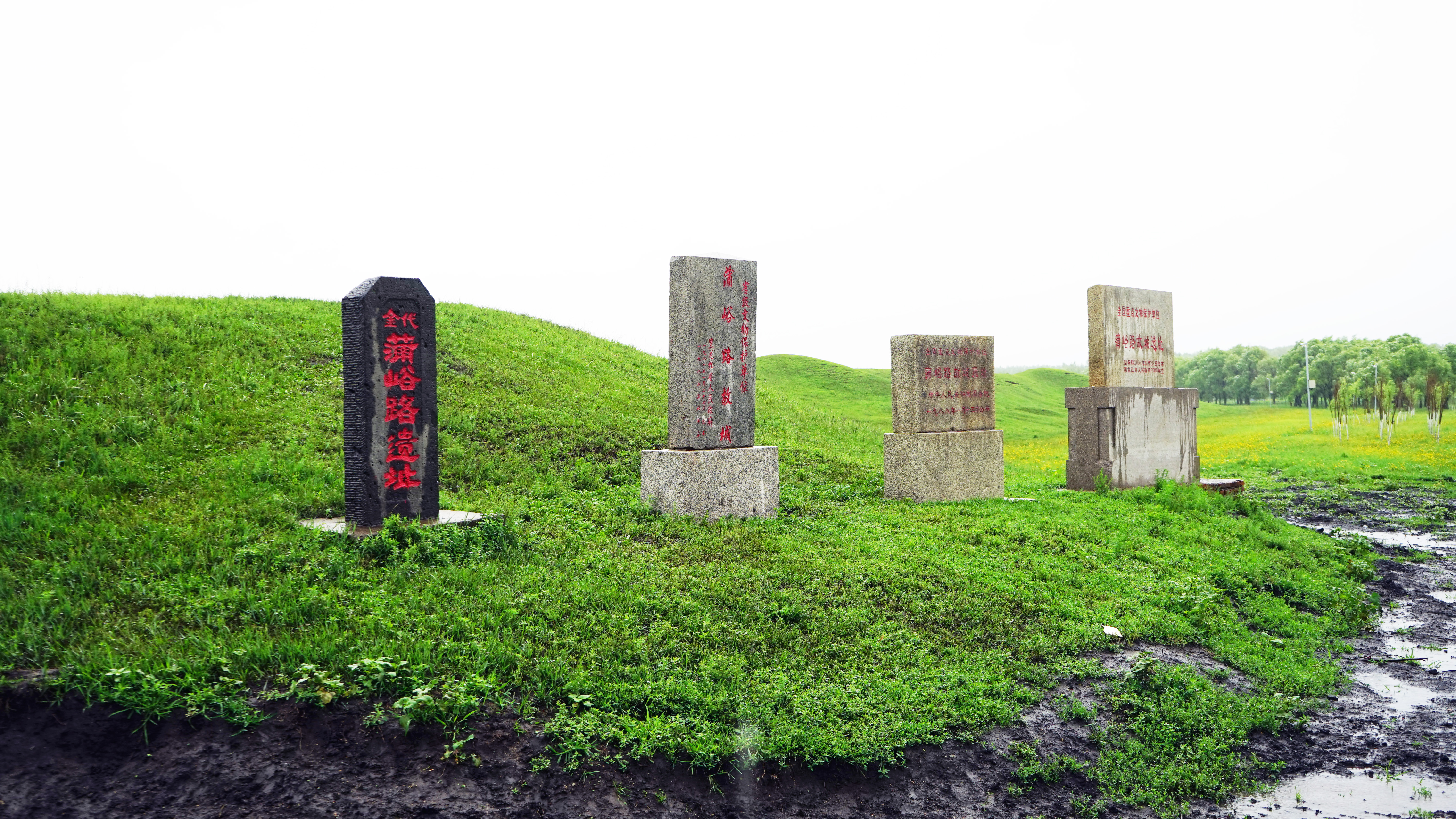 中文（中国大陆）: 蒲峪路故城遗址 文物保护碑，立于城墙遗址靠近城门处